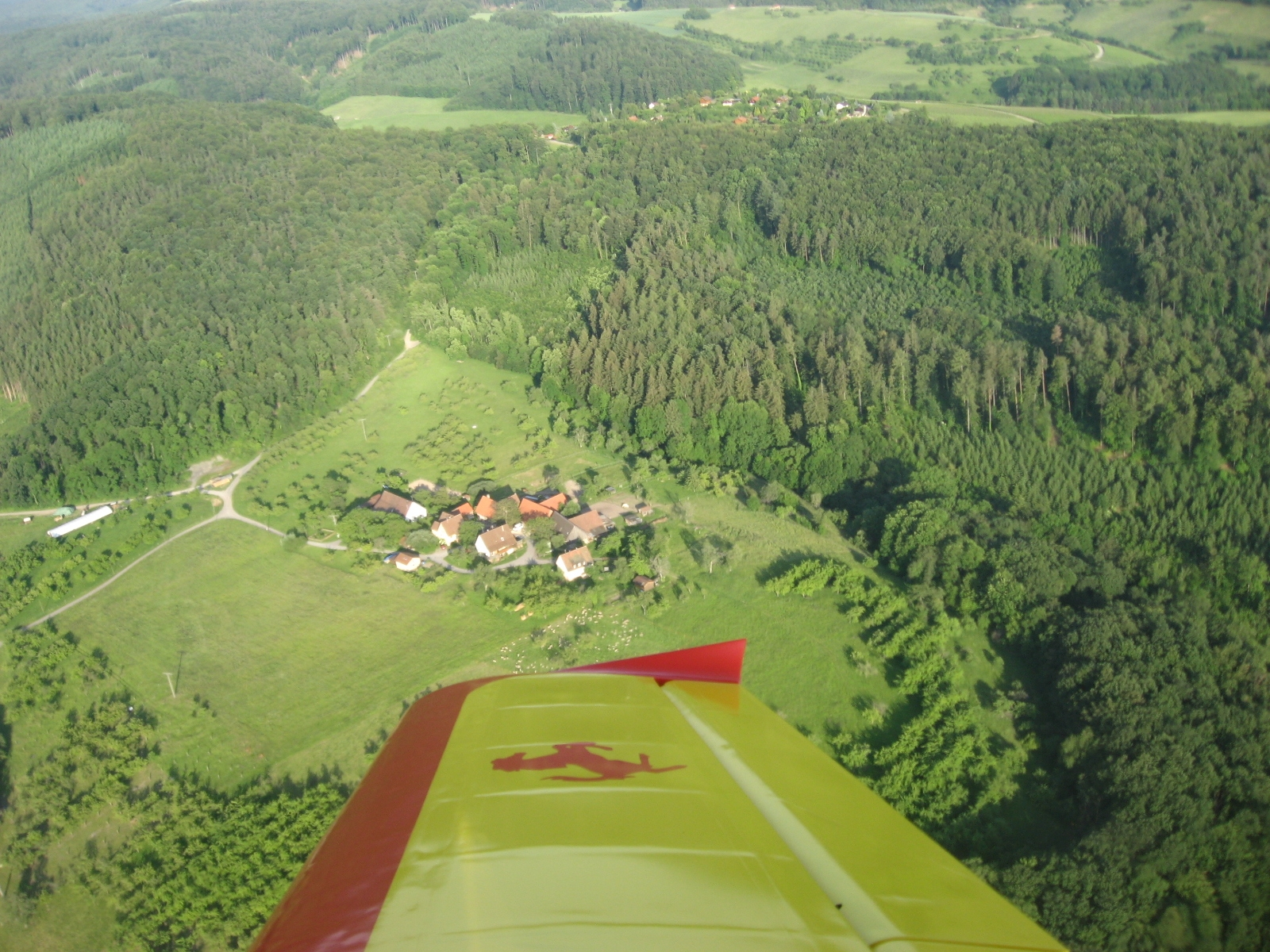 Farni